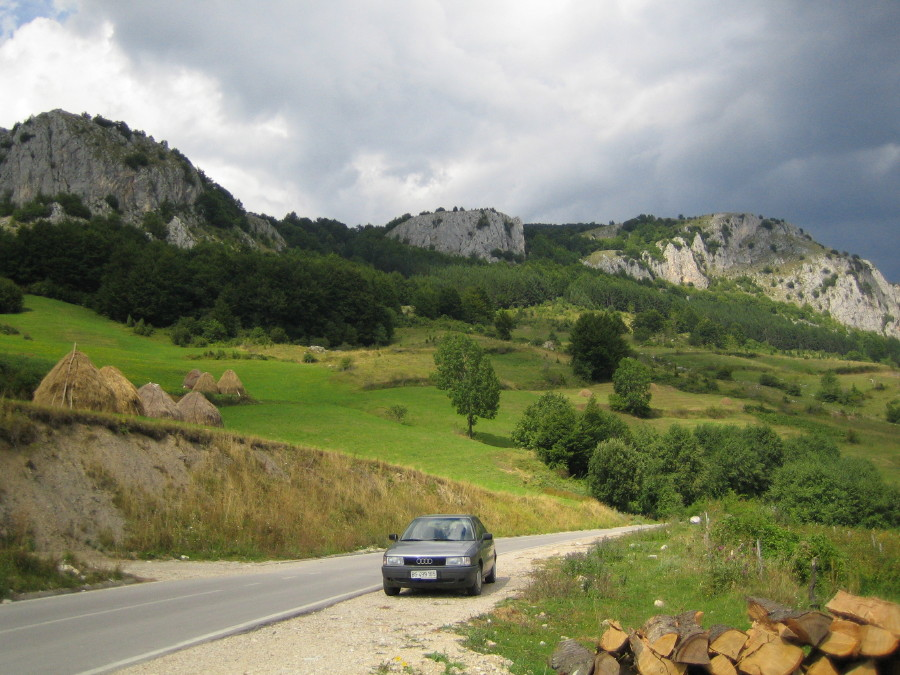 са пута поред Катића